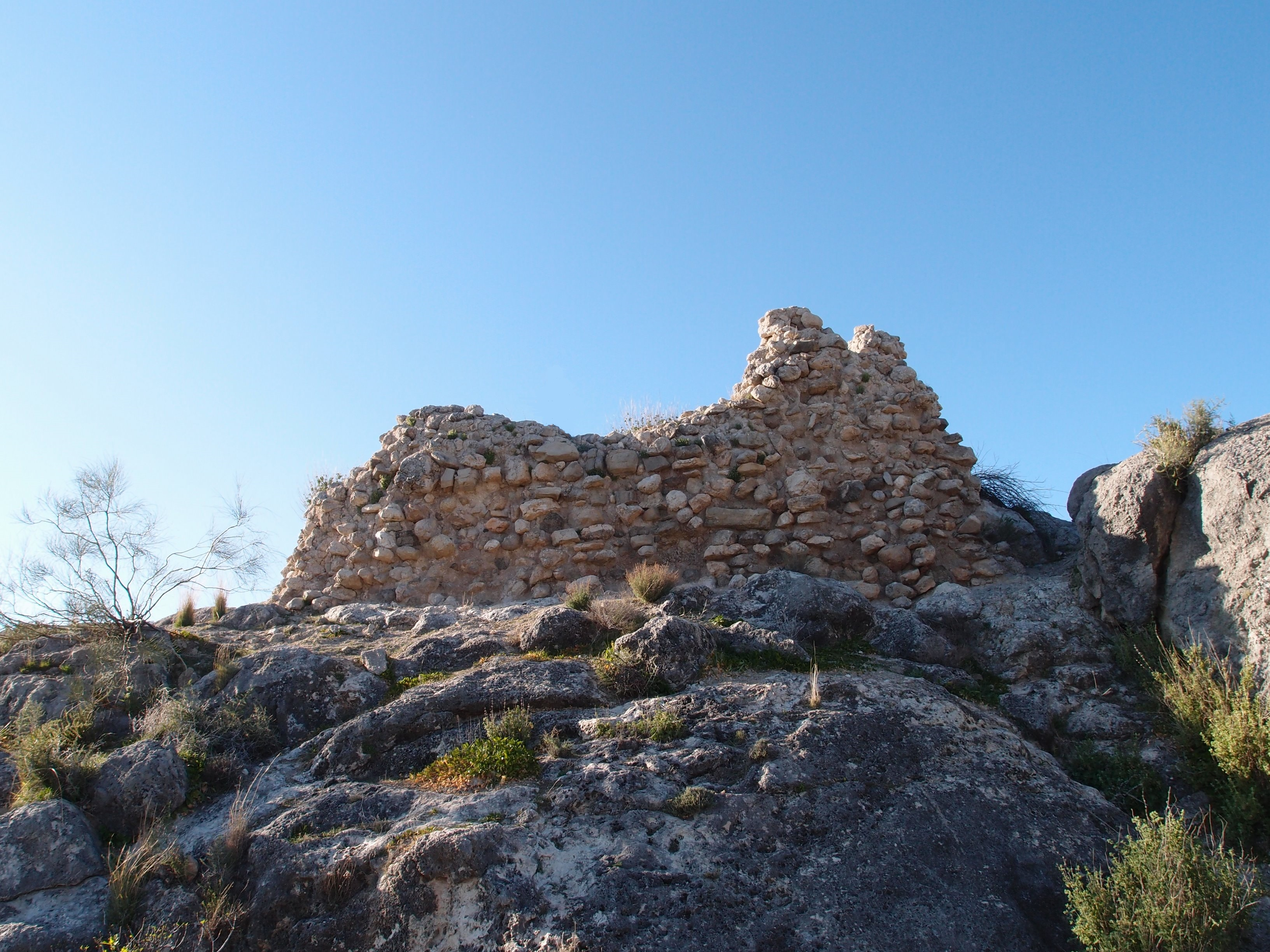 Torremocha.